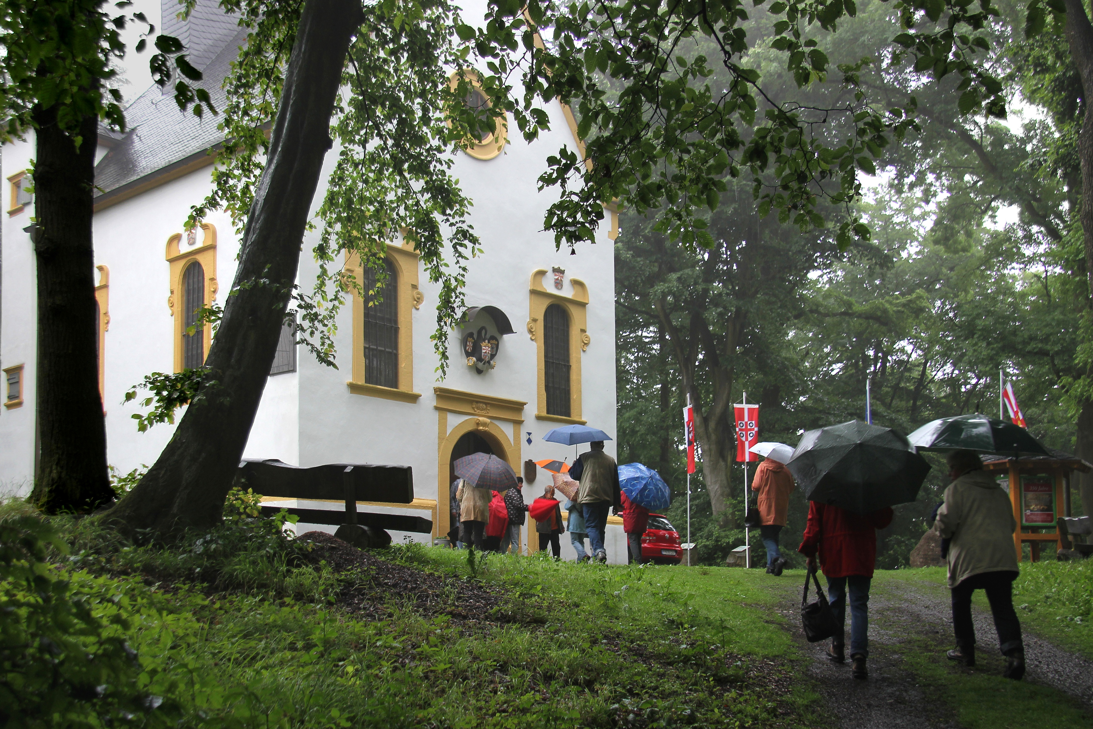 Pilger unterwegs zur Marienkapelle auf dem Karmelenberg bei Bassenheim